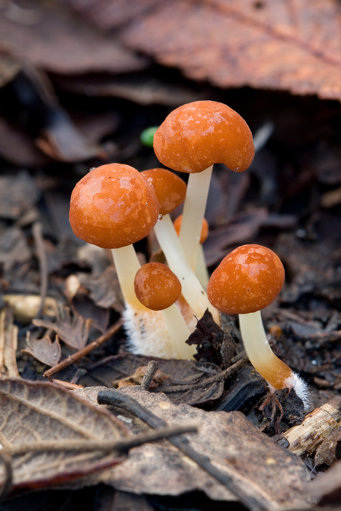 Marasmius elegans, Wielangta Forest, Tasmania